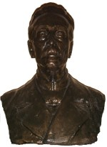 Busto in bronzo del geologo Torquato Taramelli depositato presso il liceo scientifico "Torquato Taramelli" di Pavia